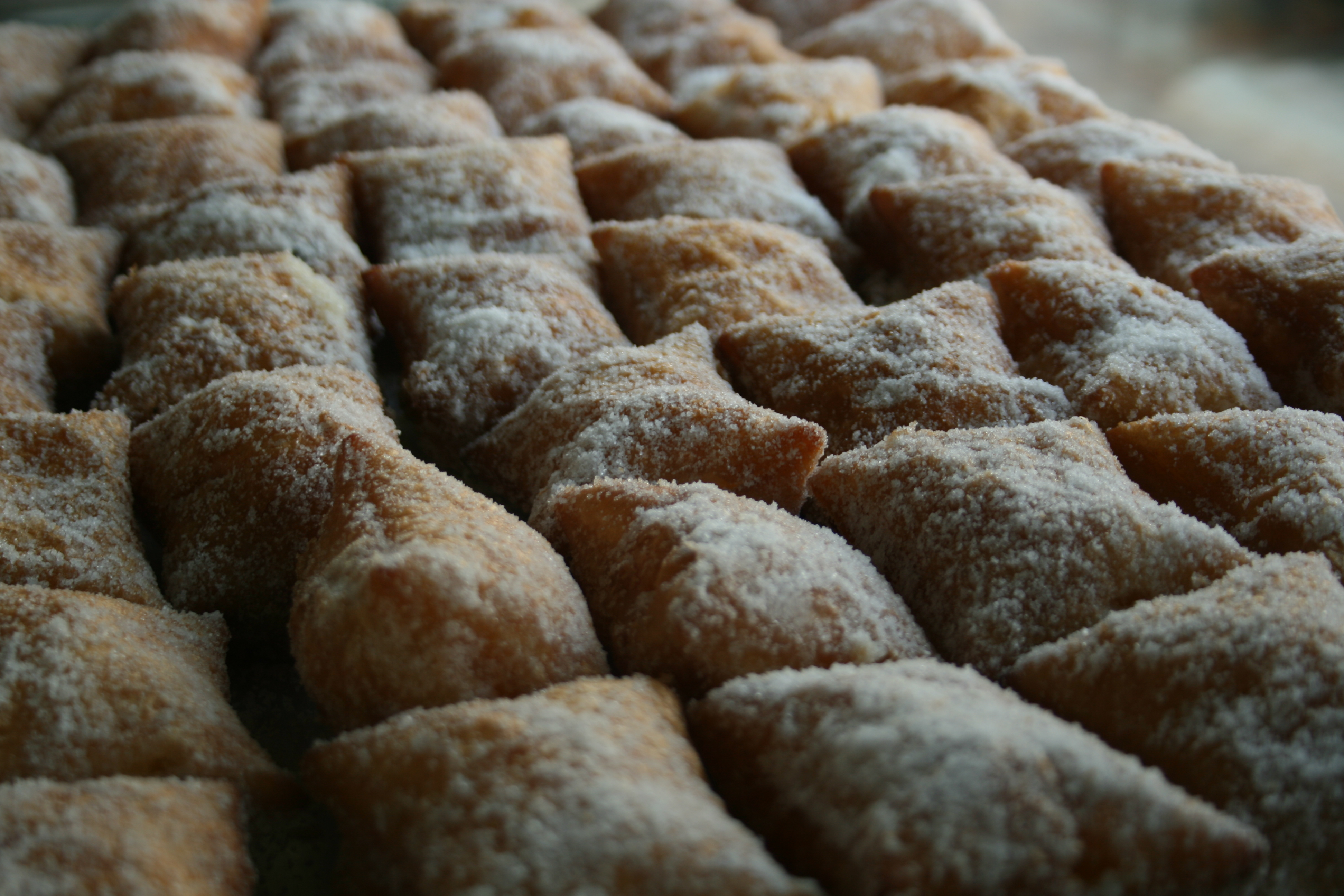 Centenarios de La Roda, pastel típico despues de los Miguelitos, la única diferencia que existe entre ellos es que, los Miguelitos son horneados y los Centenarios están fritos. La crema para los dos es la misma.(Bandeja)